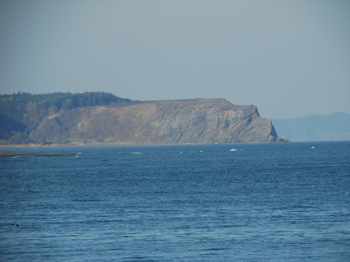 Мыс Гвоздева